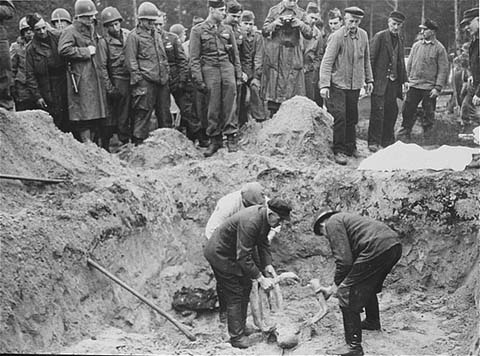 Amerikanische Truppen bei der Öffnung eines Massengrabes in Wöbbelin